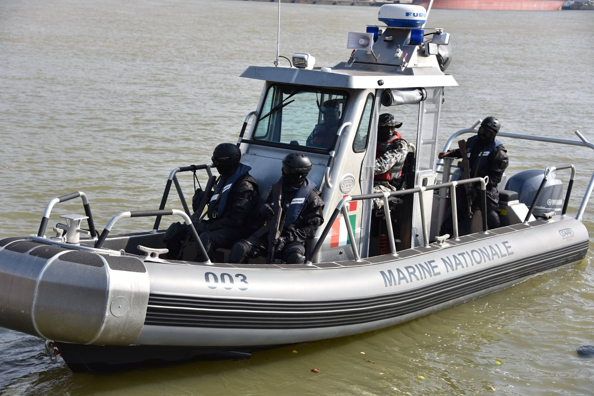 Vedette type defender